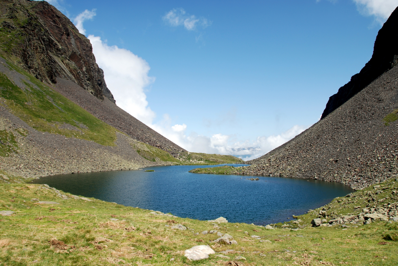 Al fondo de la foto está la Vall d'Aran pero con las nubes apenas se ve nada.